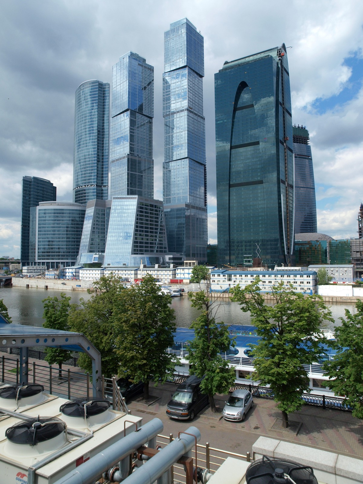 Москва. Сити в мае 2010.